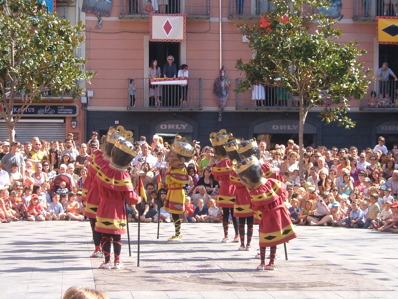 Ball dels cabeçuts